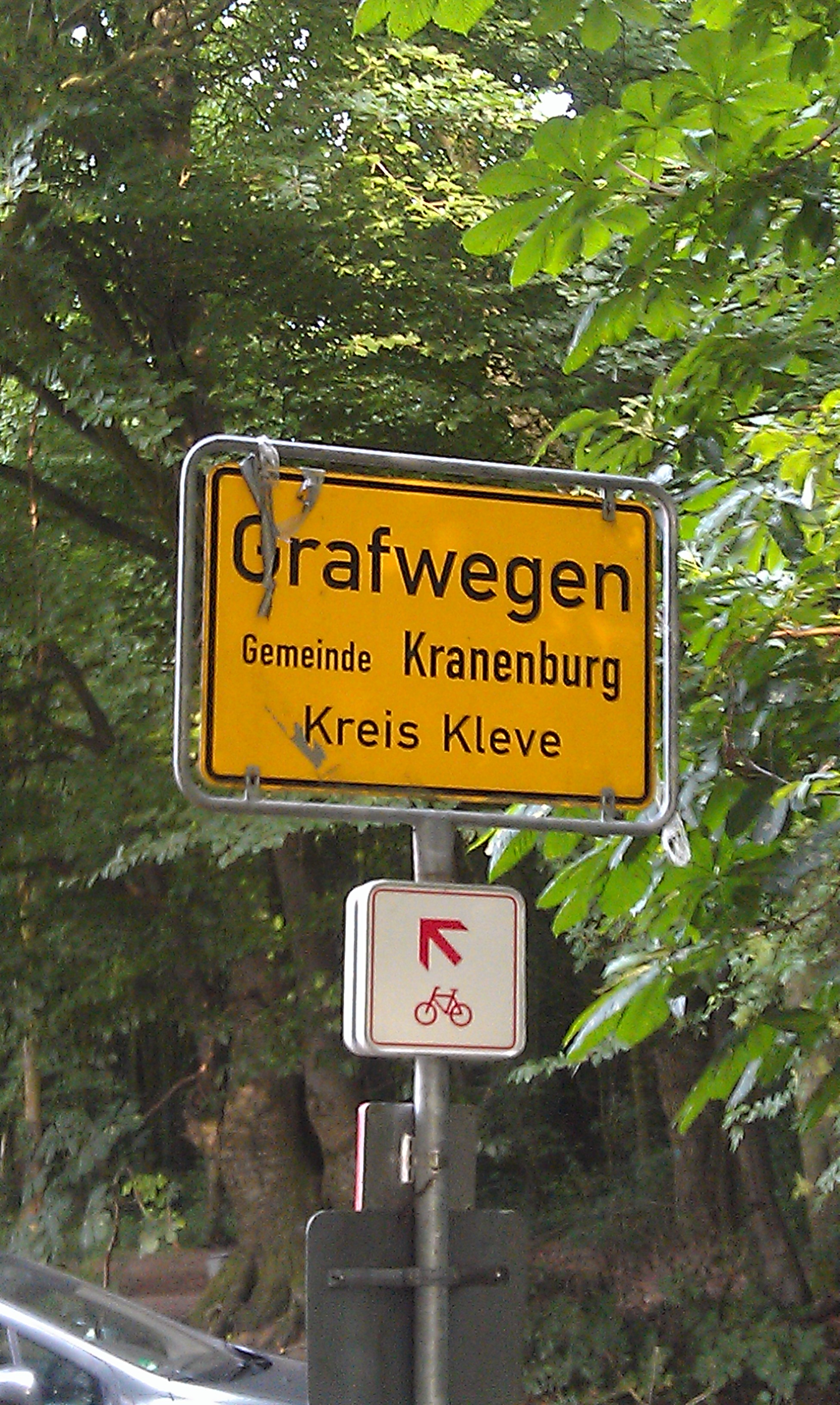 Plaatsnaambord Grafwegen, Kranenburg, Kleve